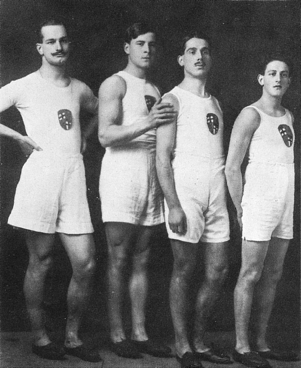 La staffetta 4×400 metri campione d'Italia nel 1914. Da sinistra a destra: Franco Giongo, Gian Ercole Salvi, Vittorio Costa e Federico Colombo.